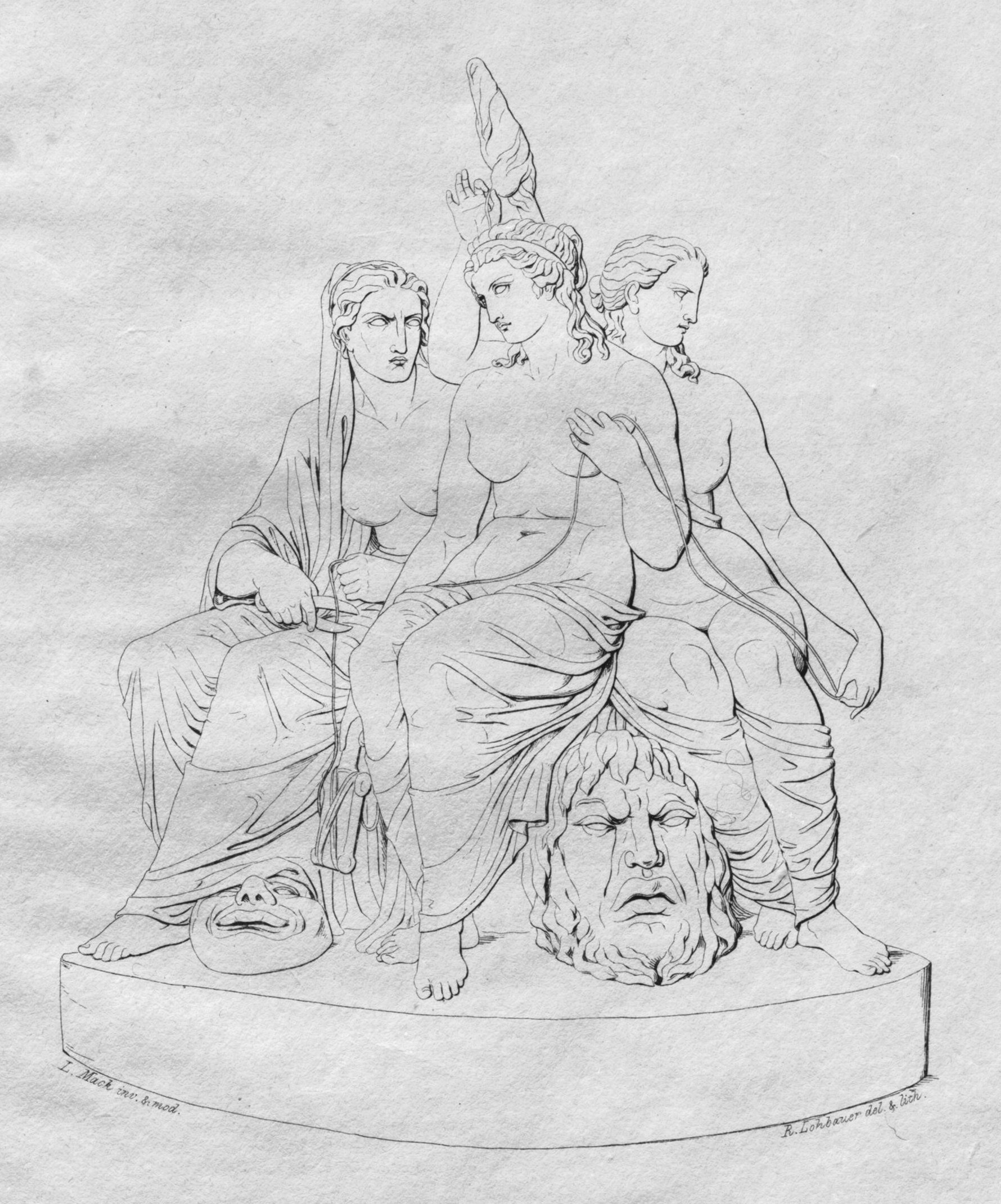 Ludwig Mack / Lithograph: Rudolph Lohbauer: Die Parzen (zwischen 1824 und 1829), Figurengruppe, Verbleib unbekannt.